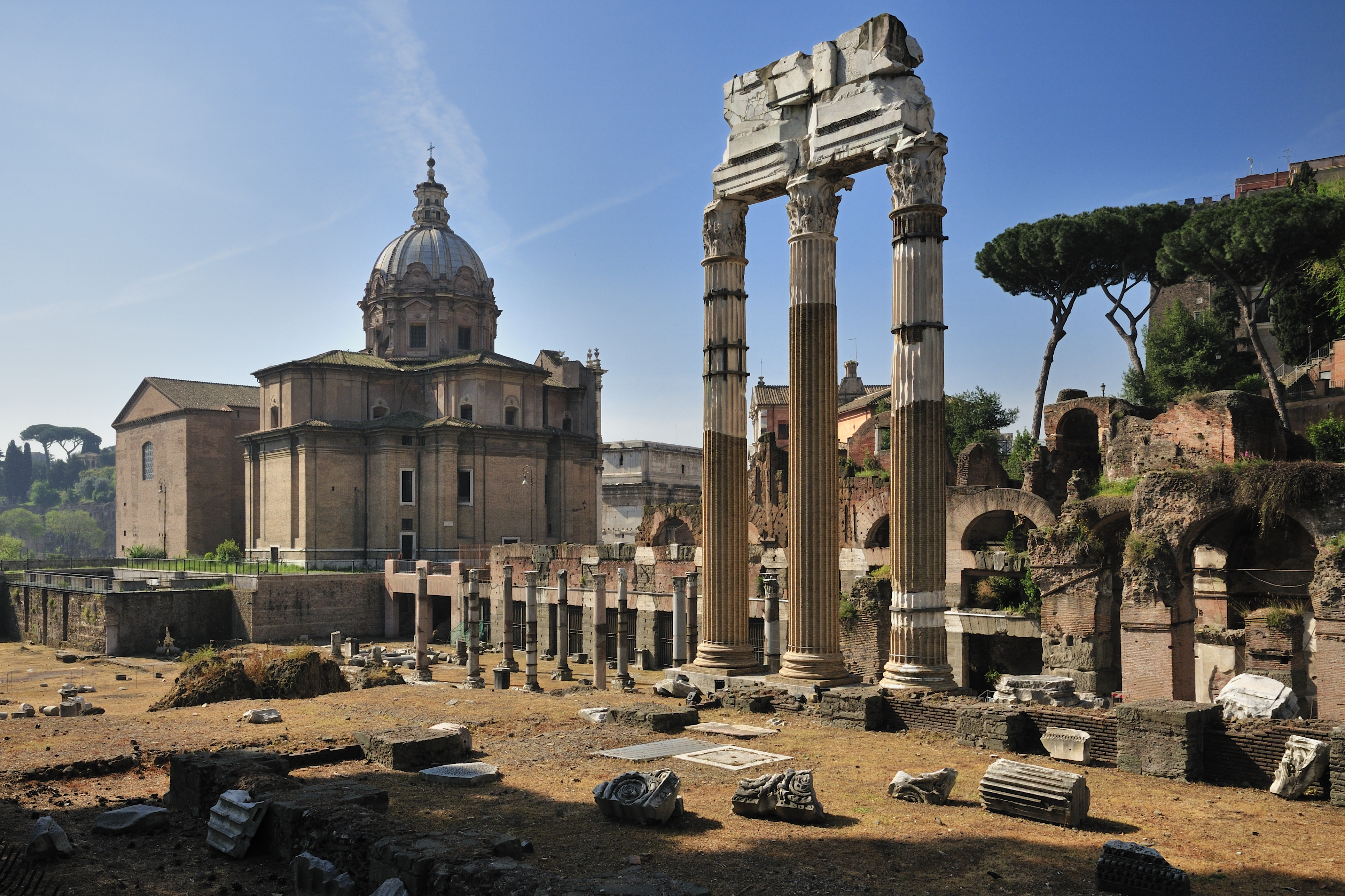 Foro di Cesare